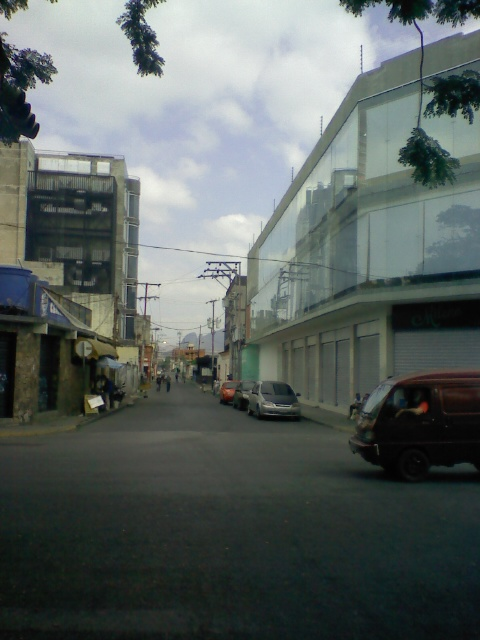 Vista de la calle Leonardo Infante